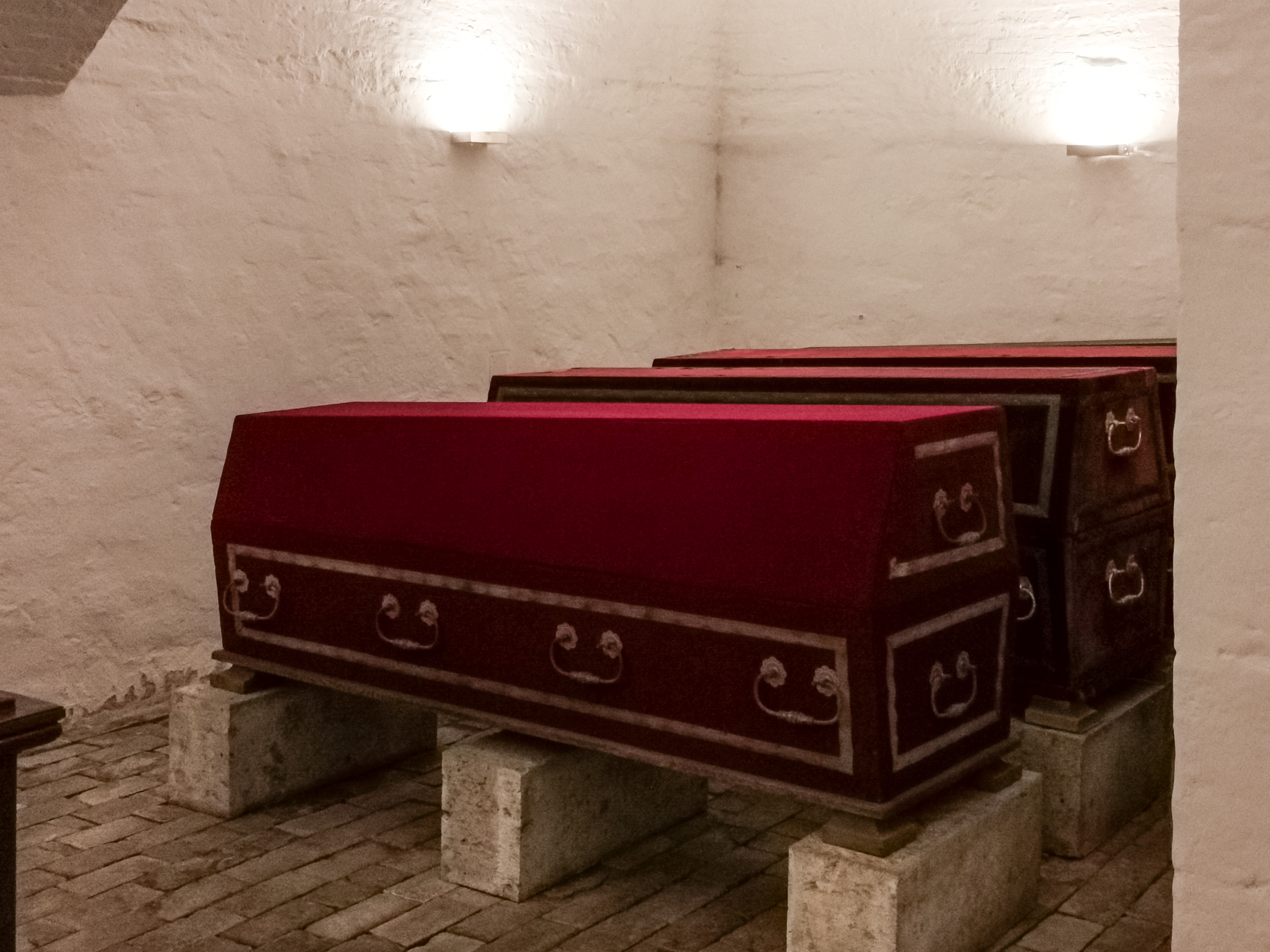 Fürstengruft Weimar; Särge von Großherzogin Caroline (1884–1905), Großherzog Carl Alexander (1818–1901) und Großherzogin Sophie (1824–1897) (von vorn nach hinten)